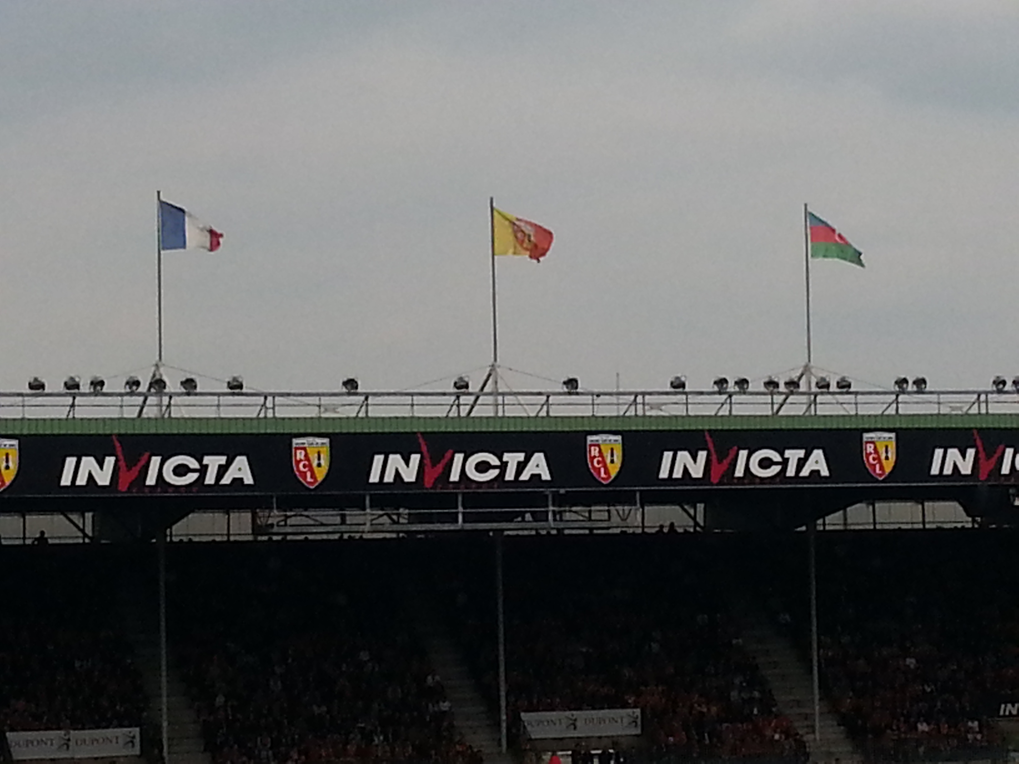 Le drapeau du RC Lens entouré par les drapeaux français et azéri